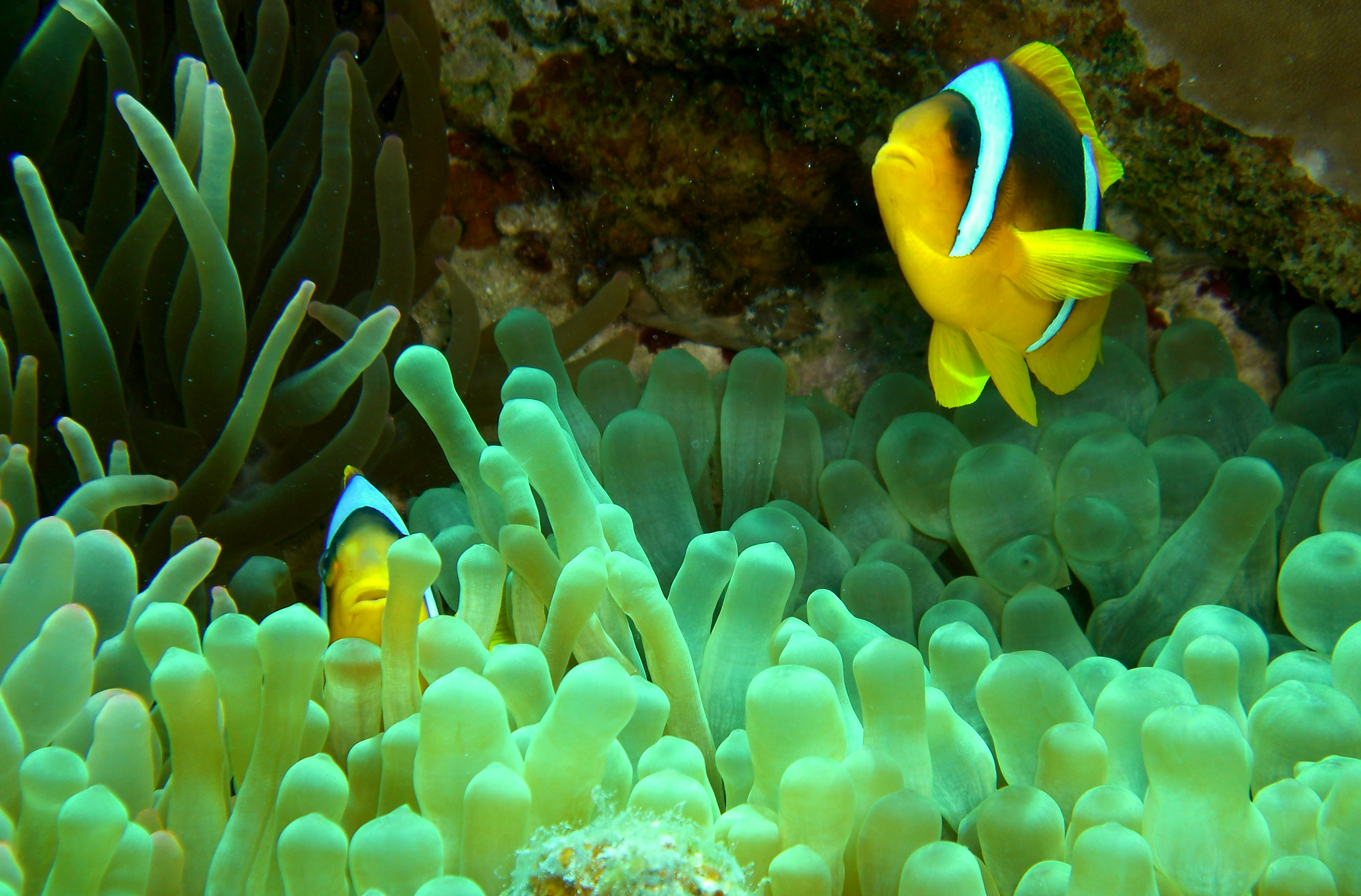 Amphiprion bicinctus in Entacmaea quadricolor